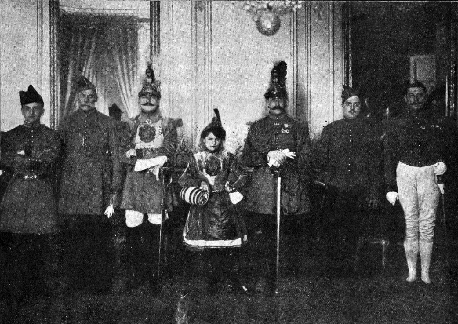 Reconstitution des uniformes des cent-gardes à l'hôtel Continental de Paris à l'occasion du centenaire de leur création.